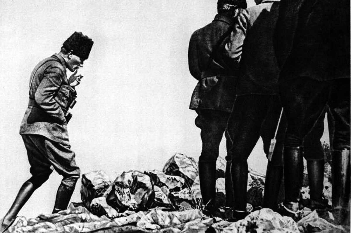 Atatürk Kocatepe'de düşünürken 1922